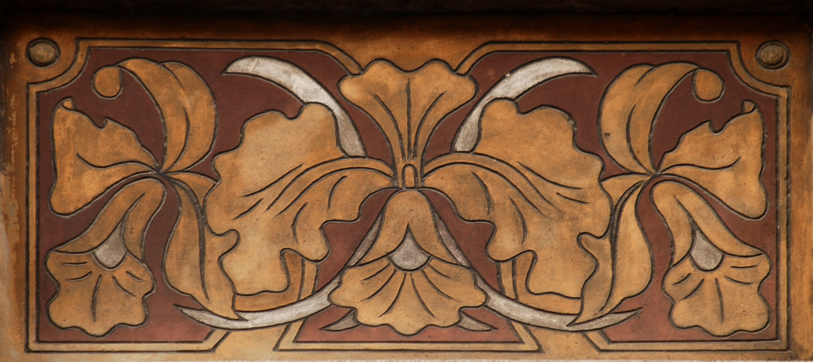 Belgique - Jambes - Charles Trussart - Rue Prinz 17 - Façade - Art nouveau